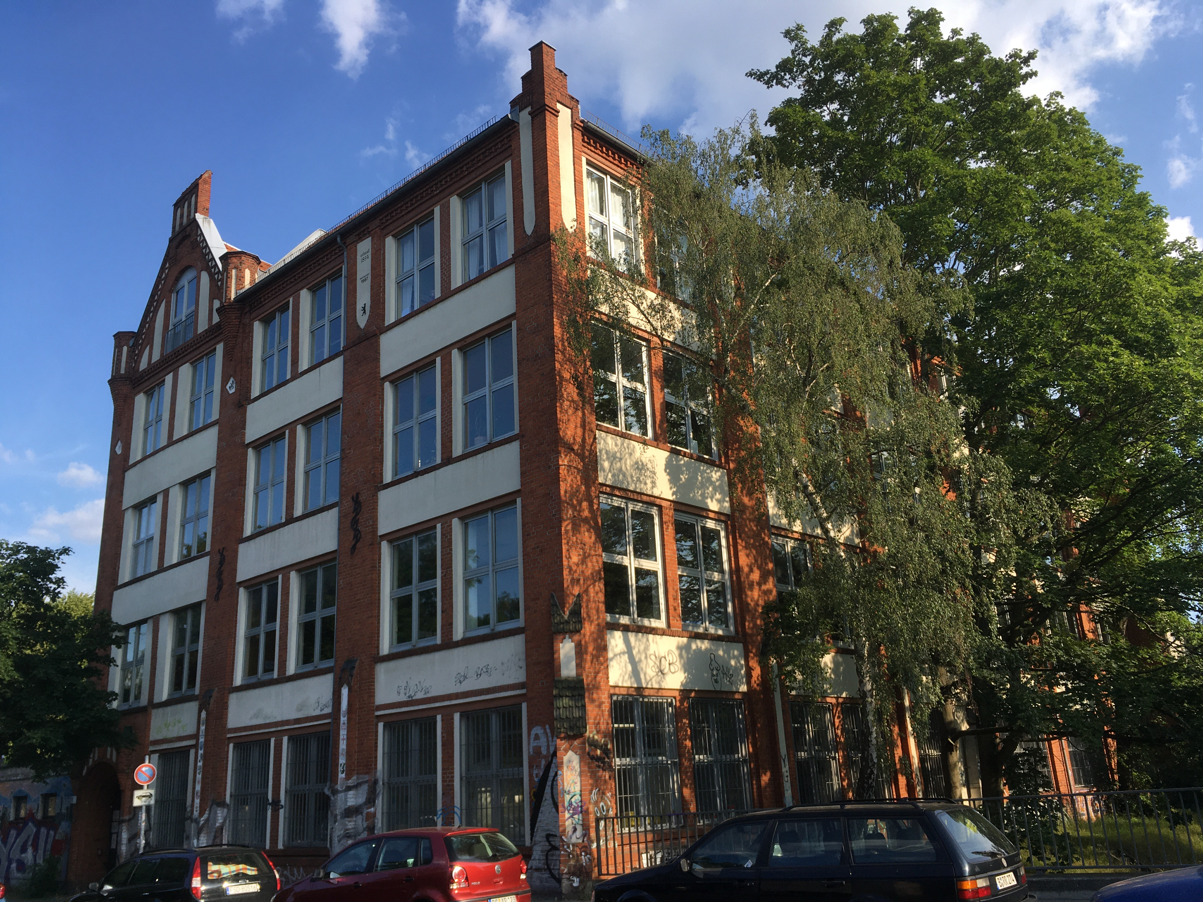 Ehemaliges Fabrikgebäude in der Nordbahnstraße 17, erbaut 1894, ab 1934/1935 Sitz der Audiotechnik-Firma Eugen Beyer, seit 1939 im Besitz der Familie Geitel, ab 1948 Sitz der Berliner Stoffdruckerei, restauriert 1987, heute Sitz der Compass Werkstätten